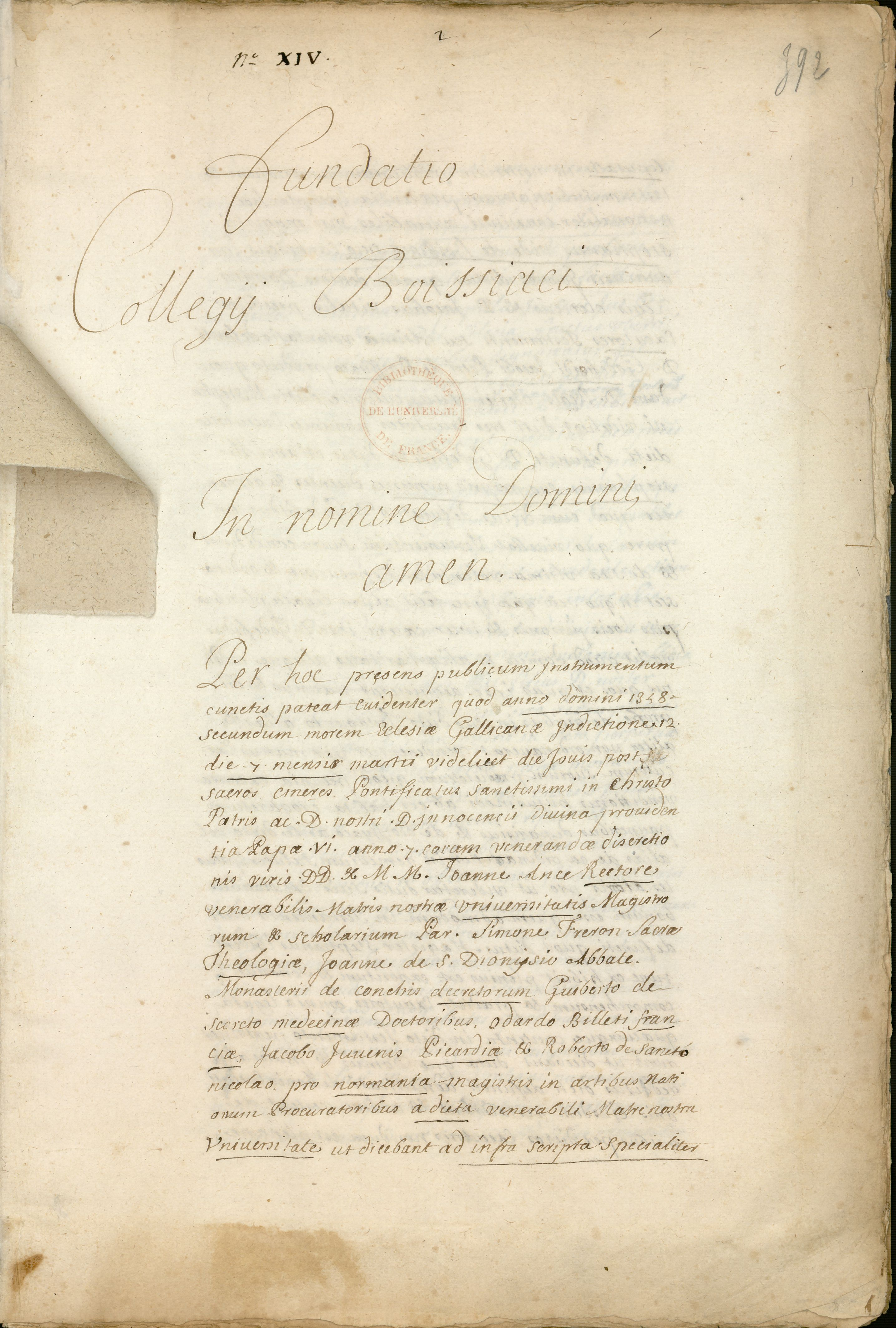 Manuscrit en latin, dans un registre de 738 feuillets consacré aux fondations et statuts des collèges.